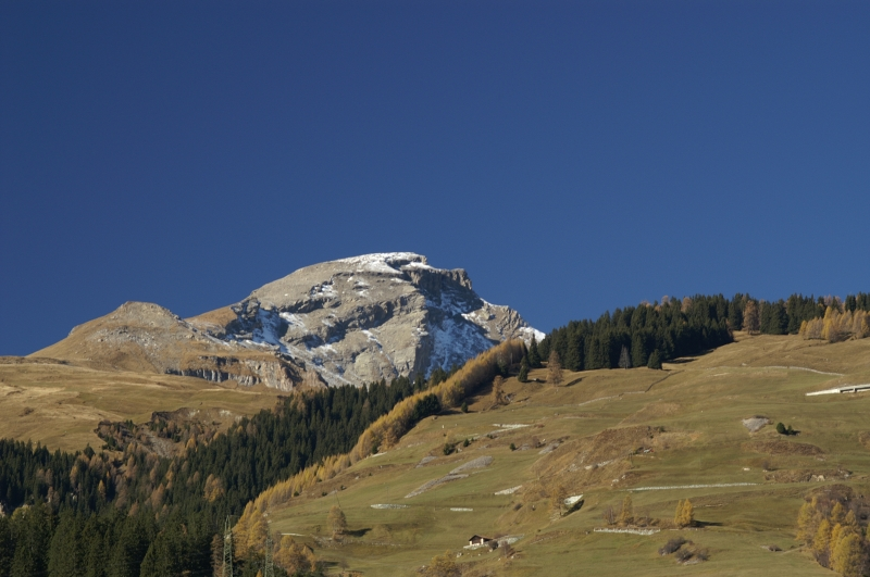 Piz Beverin vom Schams aus (Osthang)